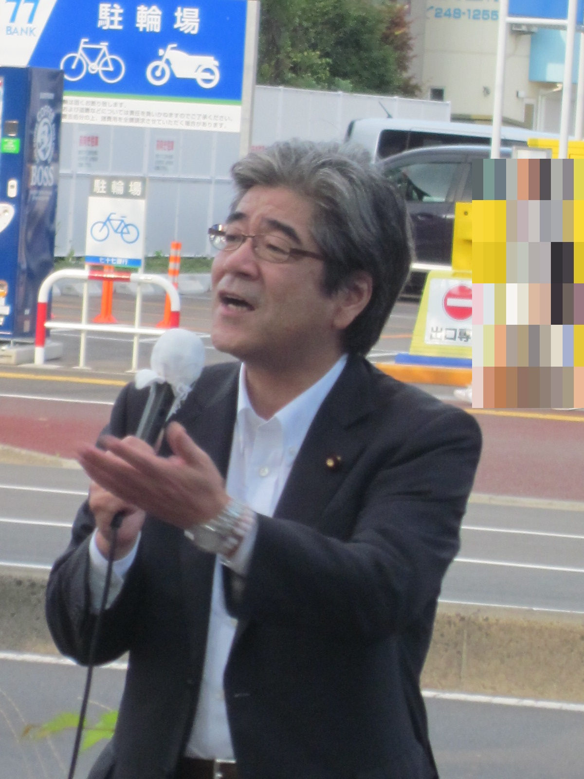 衆議院議員・土井亨。2015年7月26日、仙台市議会議員選挙応援演説にて。